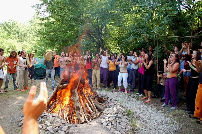 Descrizione: inipi accensione del fuoco: a questo punto, con l'Inipi completato, si accende il fuoco, nel quale sono già state poste le pietre che poi saranno usate durante la cerimonia. Note: foto scattata in Italia, giugno 2007 Fonte: Osho Circle School, Italia Autore: Osho Inipi Circle